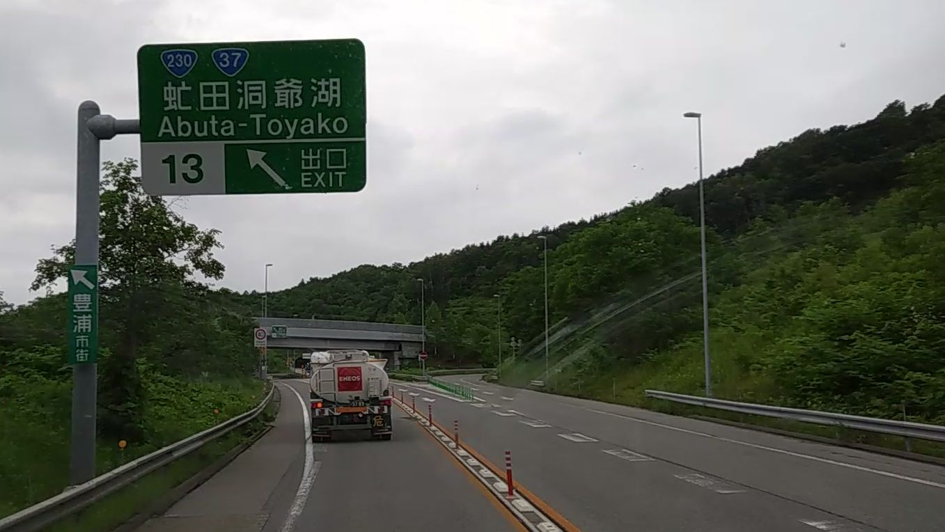 虻田洞爺湖インターチェンジ・出口-1（上り線（函館方向））